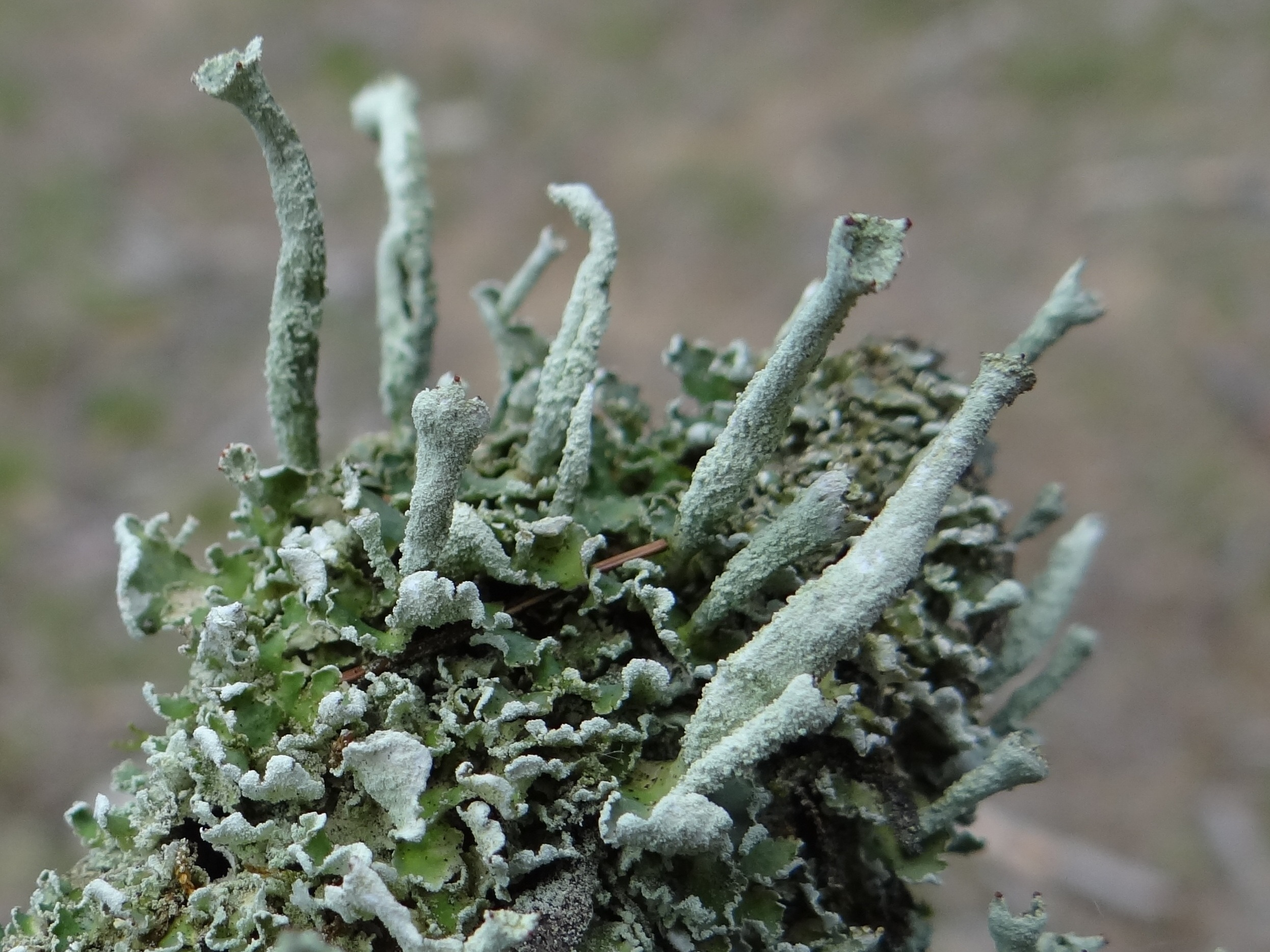 Cladonia digitata